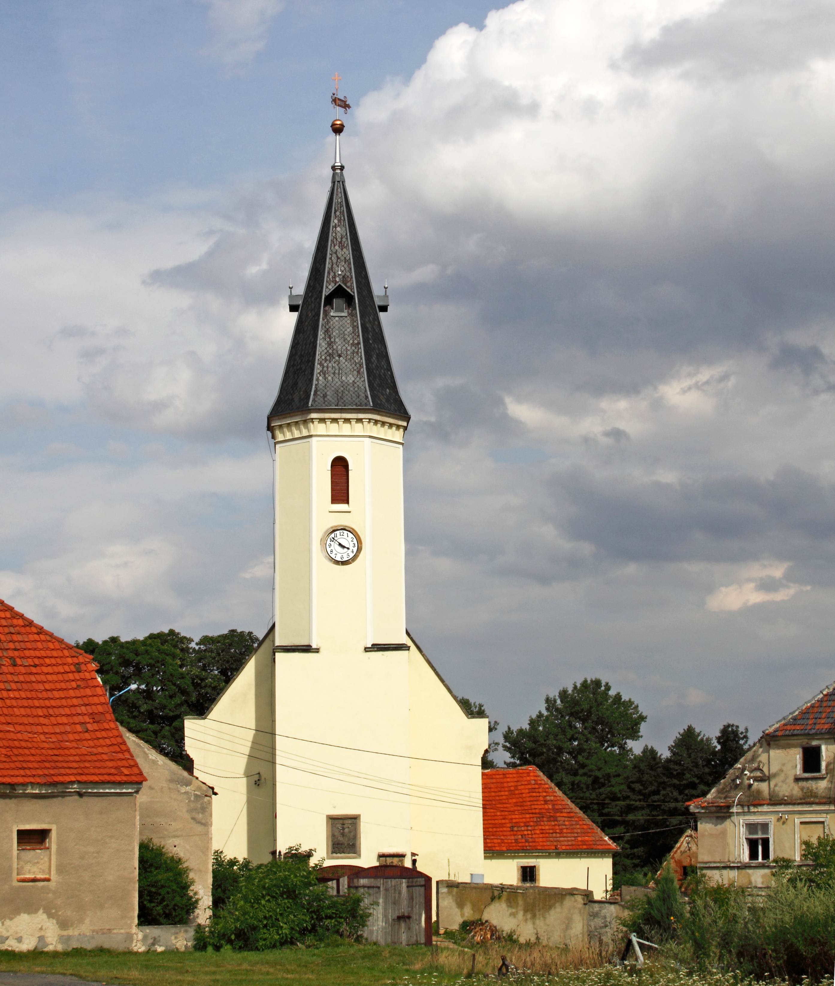 Luboradz - rzymskokatolicki kościół filialny p.w. Zaślubin NMP, 1581, 1900